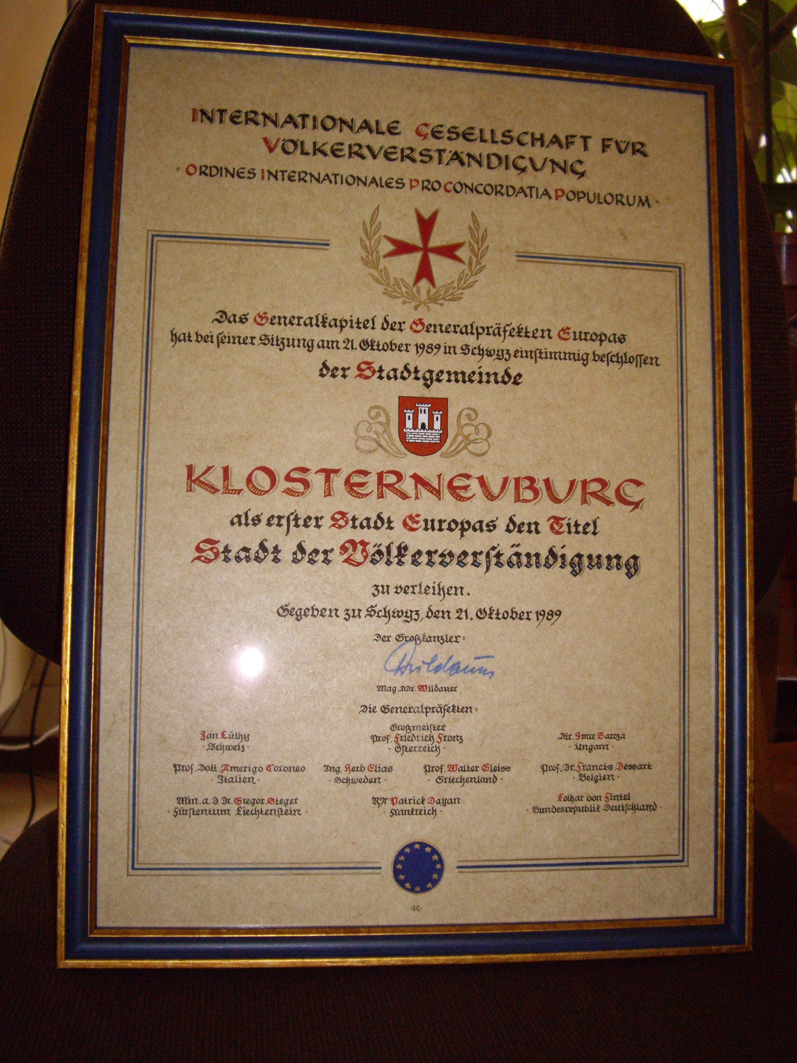 Diplomo en la arkivo de la urba komunumo Klostronovburgo